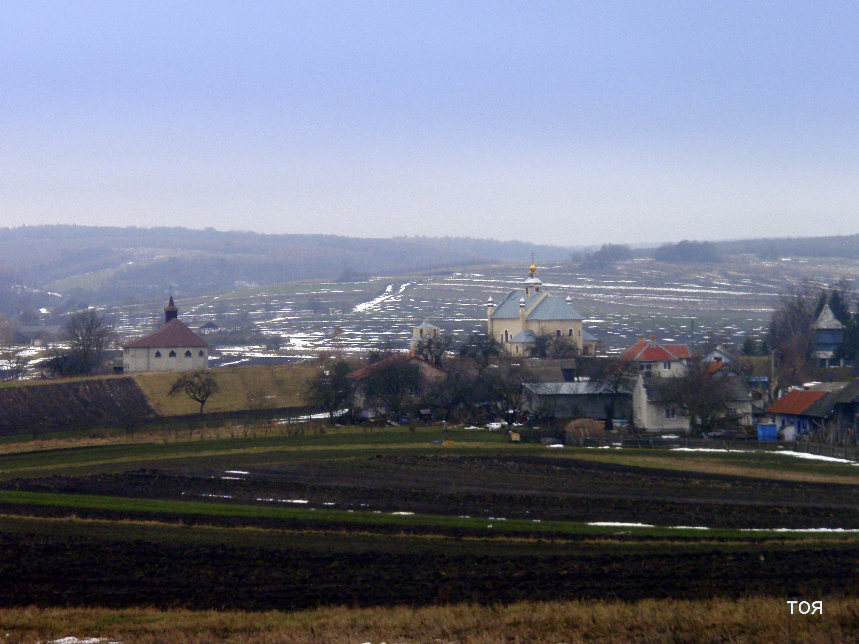 На цьому фото зображено три релігійні споруди, різних конфесій.